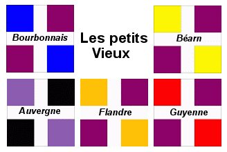 Assemblage des drapeaux des petits vieux